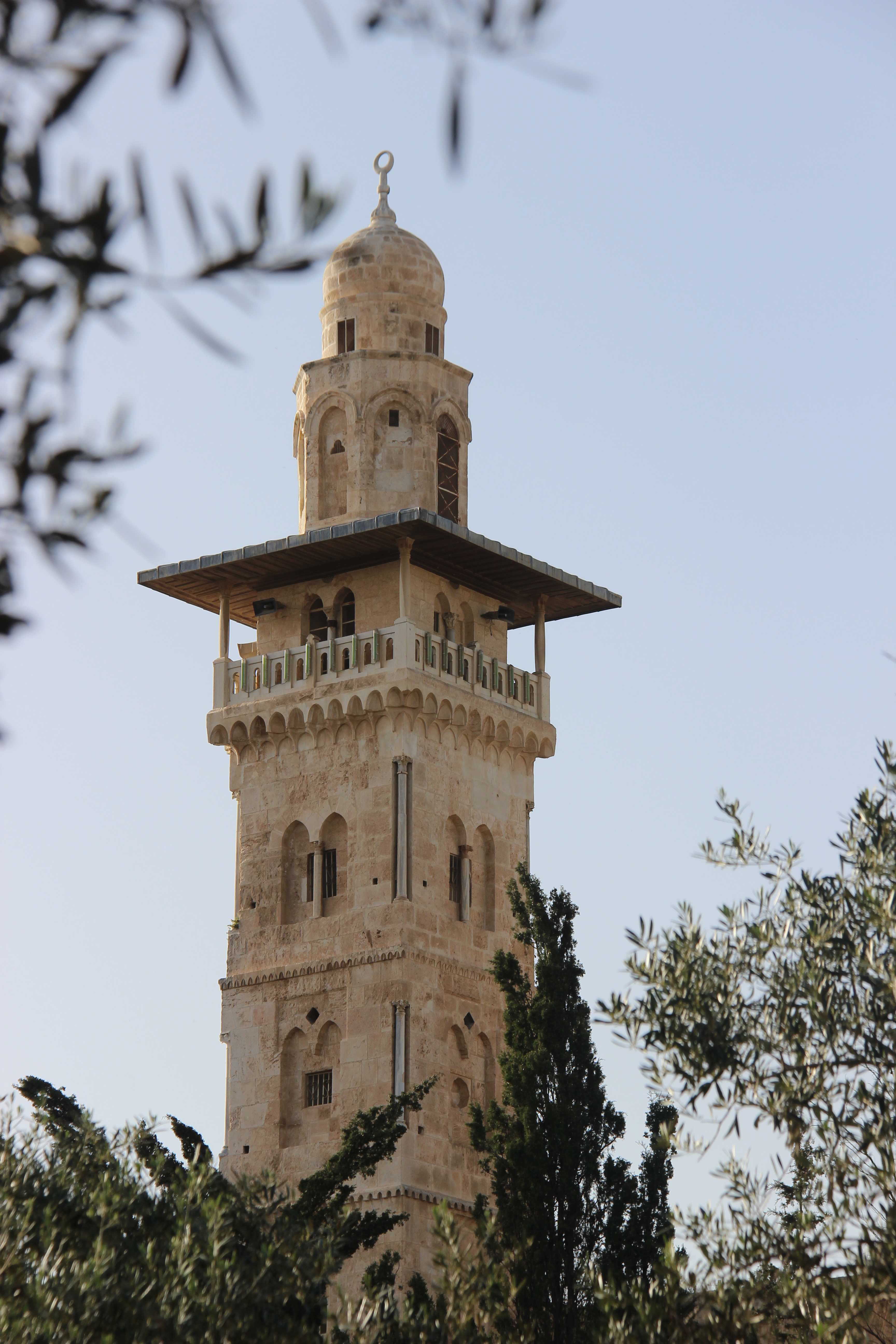 مئذنة باب الغوانمة، إحدى مآذن المسجد الأقصى في القدس.